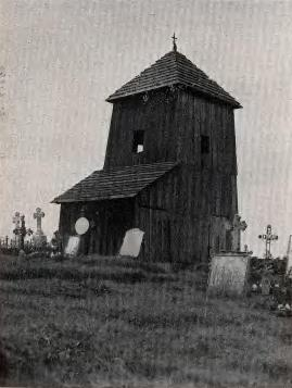 Kaplica w Tłustorębach